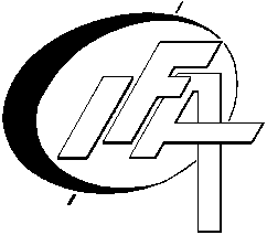 Logo der Internationale der Anarchistischen Föderationen